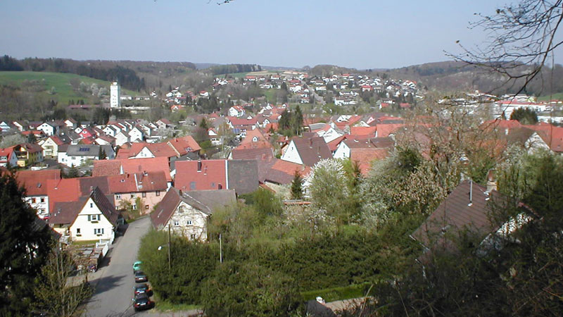 Blick über Neidenstein (Rhein-Neckar-Kreis) vom Burgberg aus